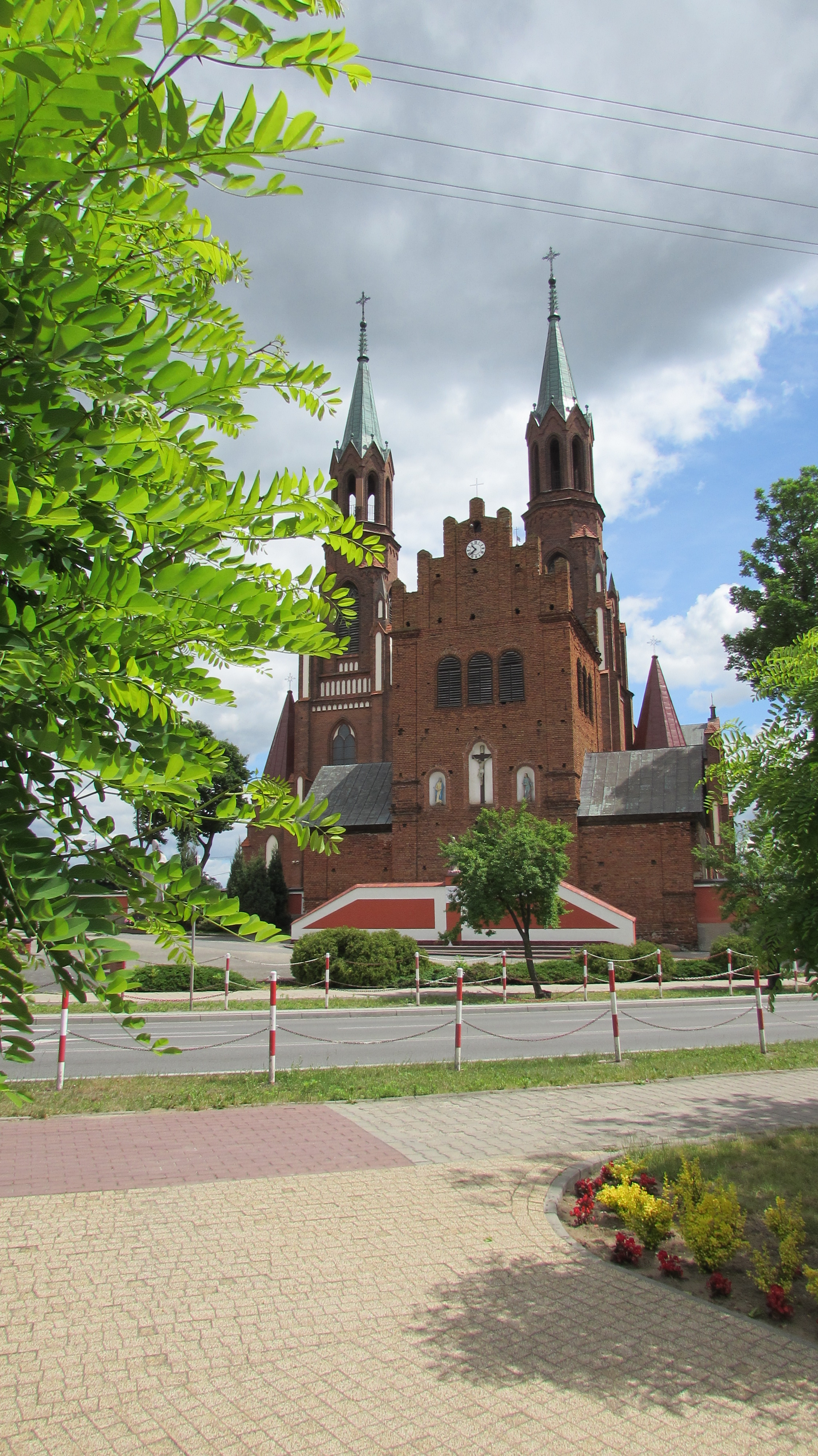 Myszyniec Kirche Ansicht2